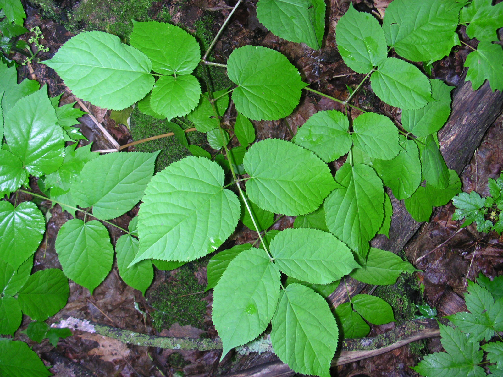 Aralia_racemosa_1-jgreenlee